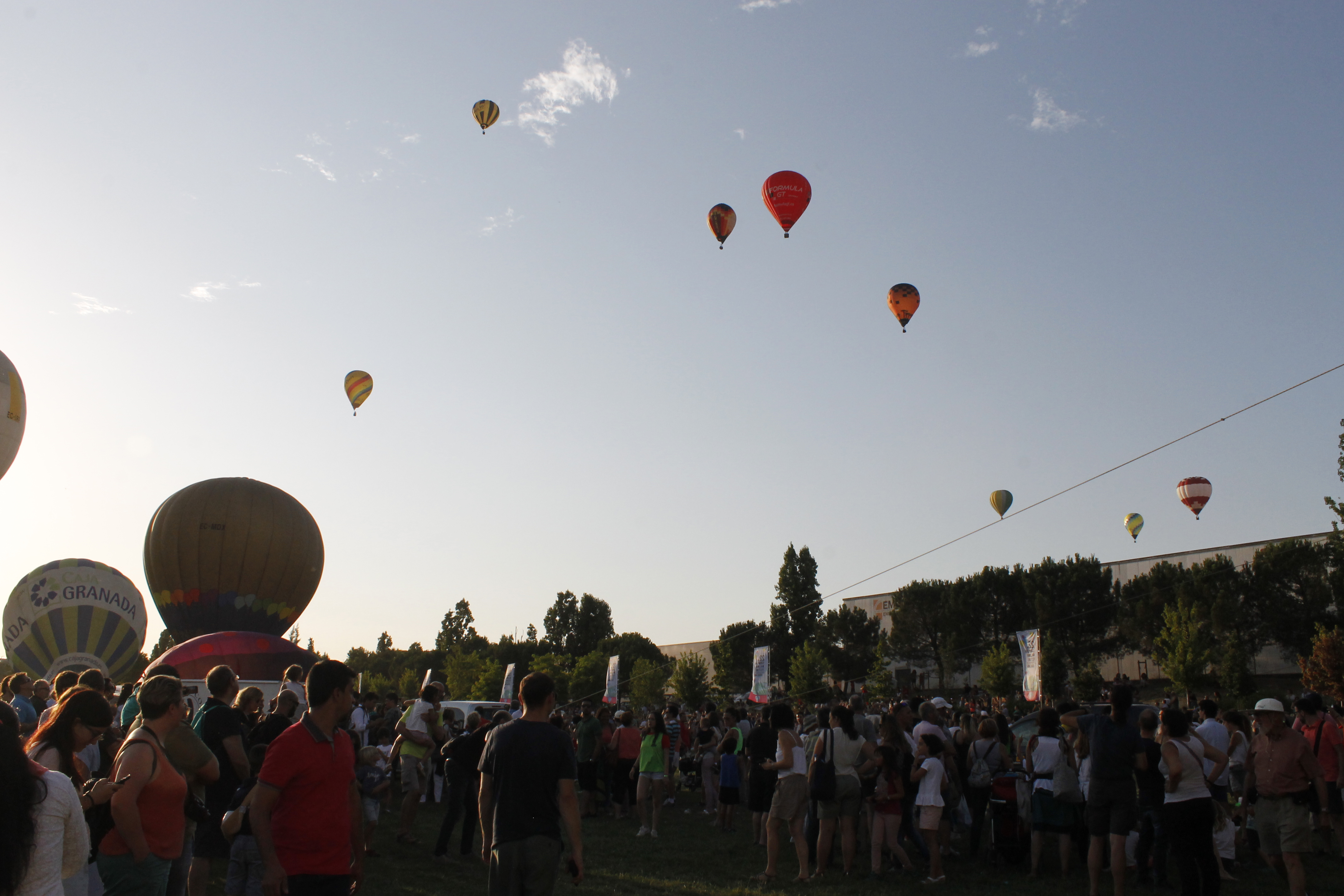 Fiesta en el Parque Central, el sábado día 14 de julio (European Balloon Festival 2018)